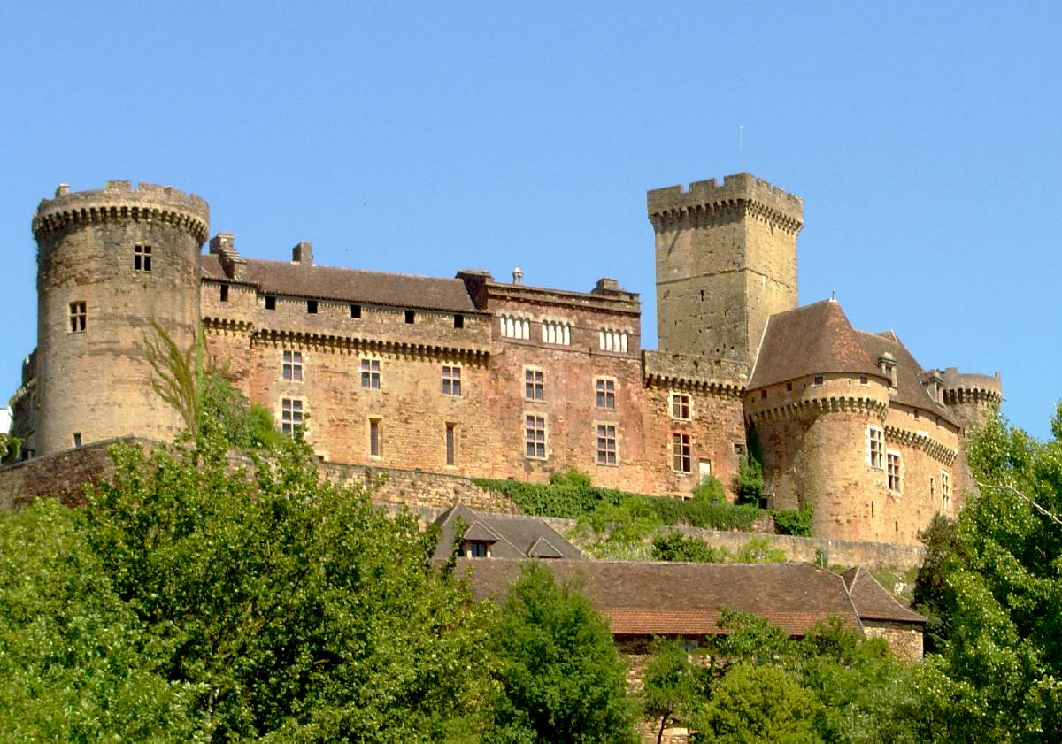 château_de_Castelnau-Bretenoux, photo personnelle prise en juillet 2004 - Luna04